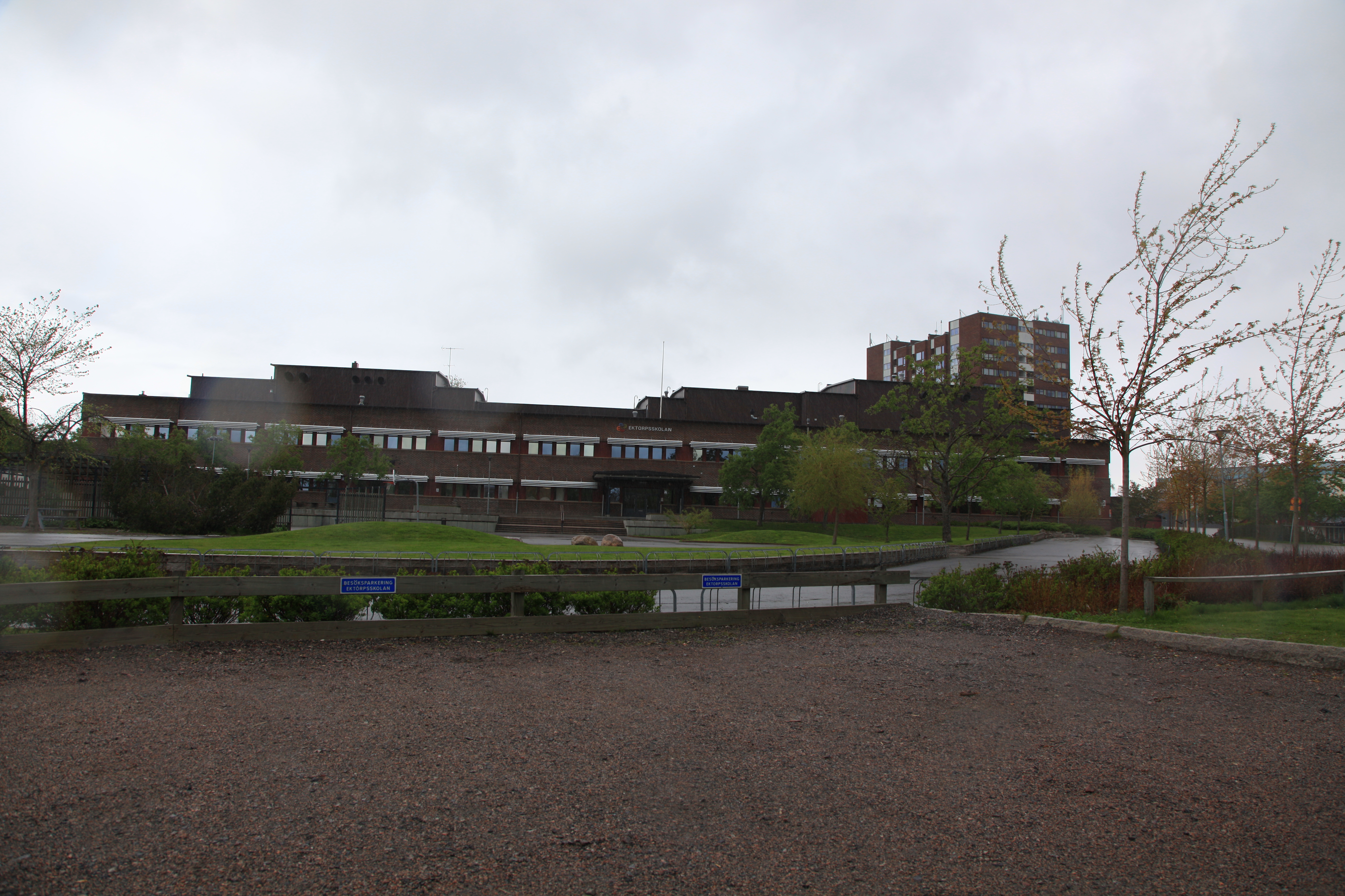 Ektorpsskolan in Norrköping